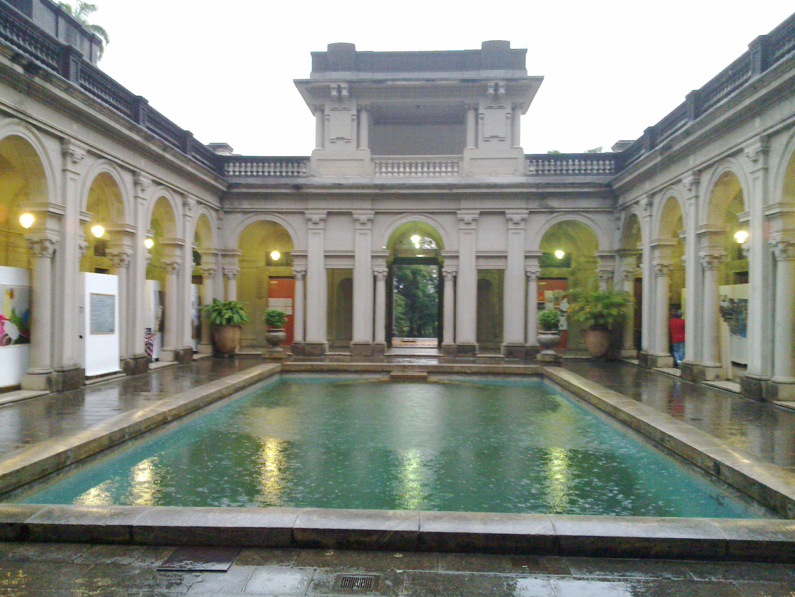 Fotografado durante o Seminário Museus e Cidades Criativas